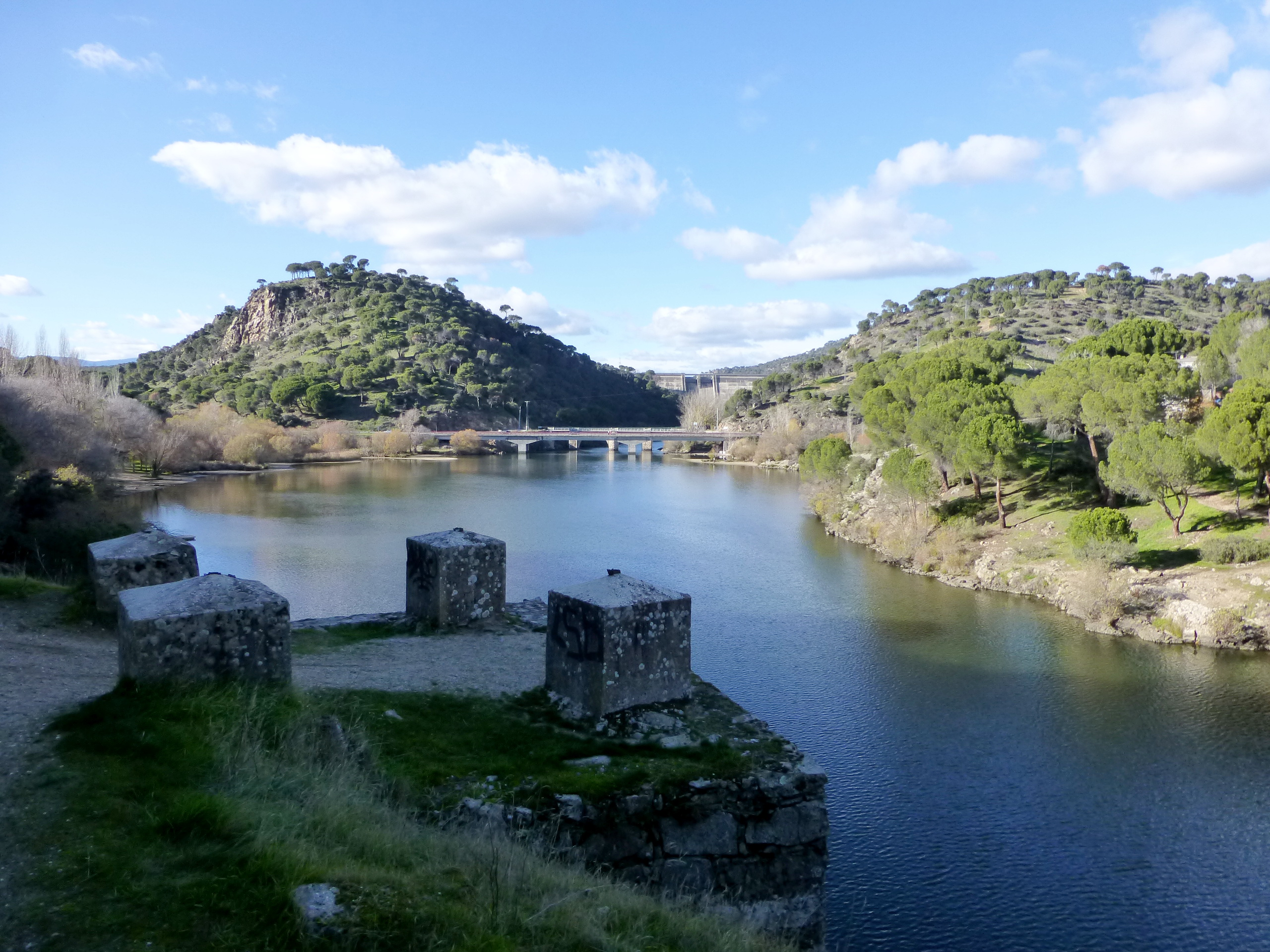 Cola del Embalse de Picadas, al fondo el puente y la presa de San Juan.